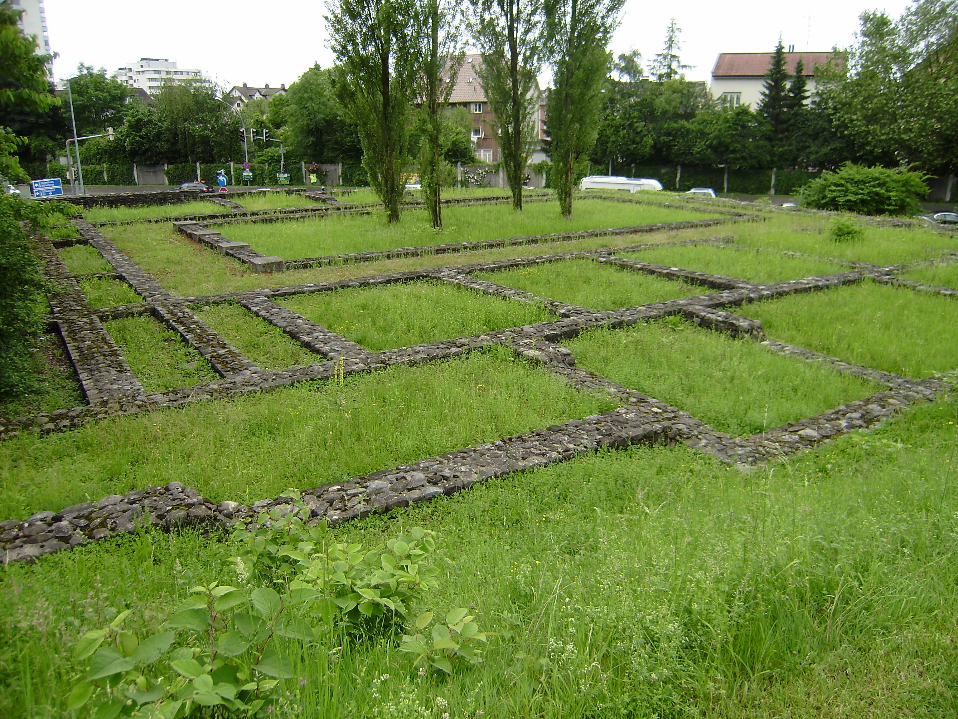 Römische Villa am Steinbühel in Bregenz (Vorarlberg)